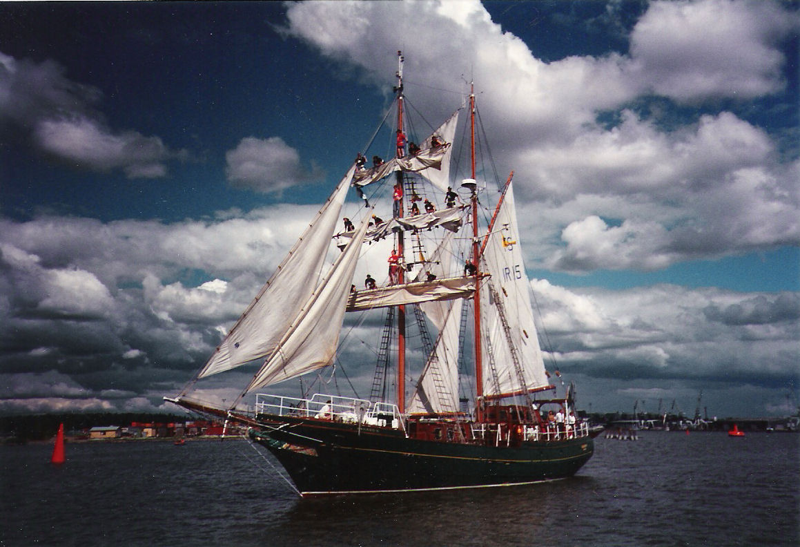 Le Asgard II , brick goélette irlandaise